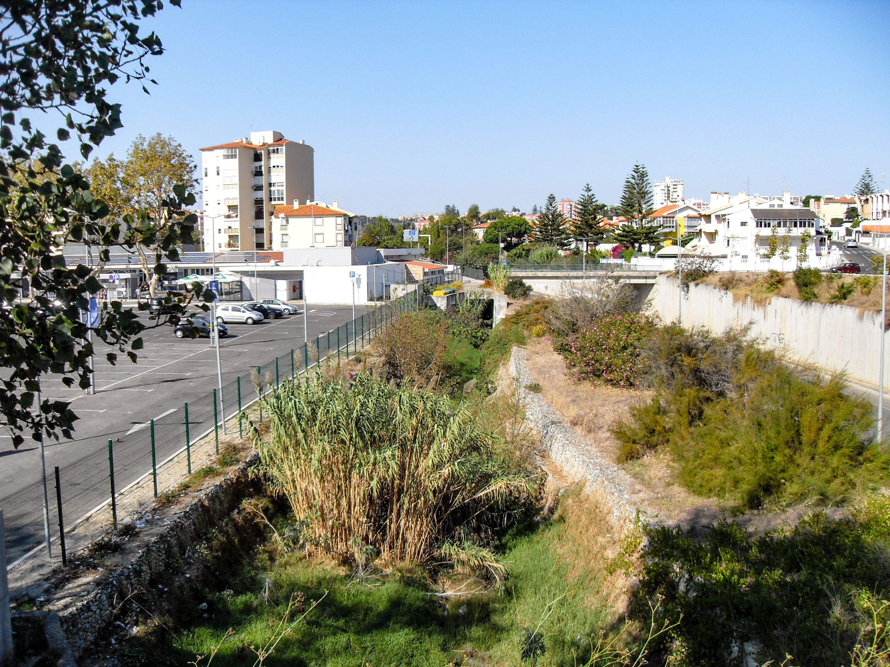 Canal da Ribeira de Sassoeiros junto à EN6-7 em Carcavelos.